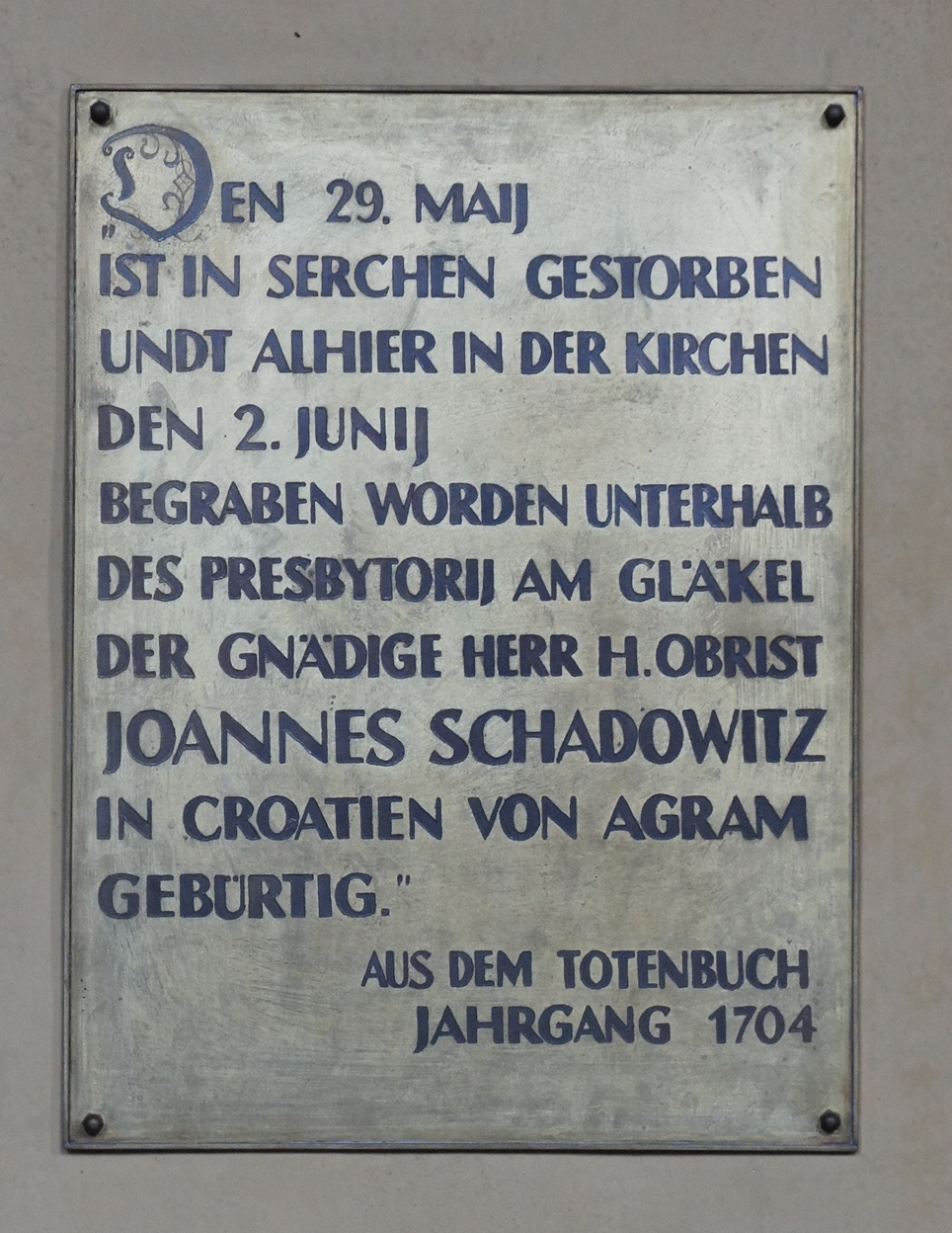 Katoholische Pfarrkirche "St. Mariä Himmelfahrt" in Wittichenau. Bereits um 1000 soll eine Holzkirche existiert haben, sie wurde 1230 ersetzt, 1429 durch die Hussiten zerstört, dann wieder aufgebaut bis 1440. Danach immer wieder Reparaturen und Erweiterungen, der letzte größere Eingriff in die dreischiffige Hallenkirche erfolgte 1971/72, bei der die Emporeneinbauten, mit Ausnahme der Orgelempore, entfernt wurden. Gedenktafel für Krabat (Johannes Schadowitz). Text: Den 29. Maij ist in Serchen gestorben undt alhier in der Kirchen den 2. Junij begraben worden utnerhalb des presbytorij am Gläkel der Gnädige Herr H. Obrist Johannes Schadowitz in Croatien von Agram gebürtig. Aus dem Totenbuch Jahrgang 1704